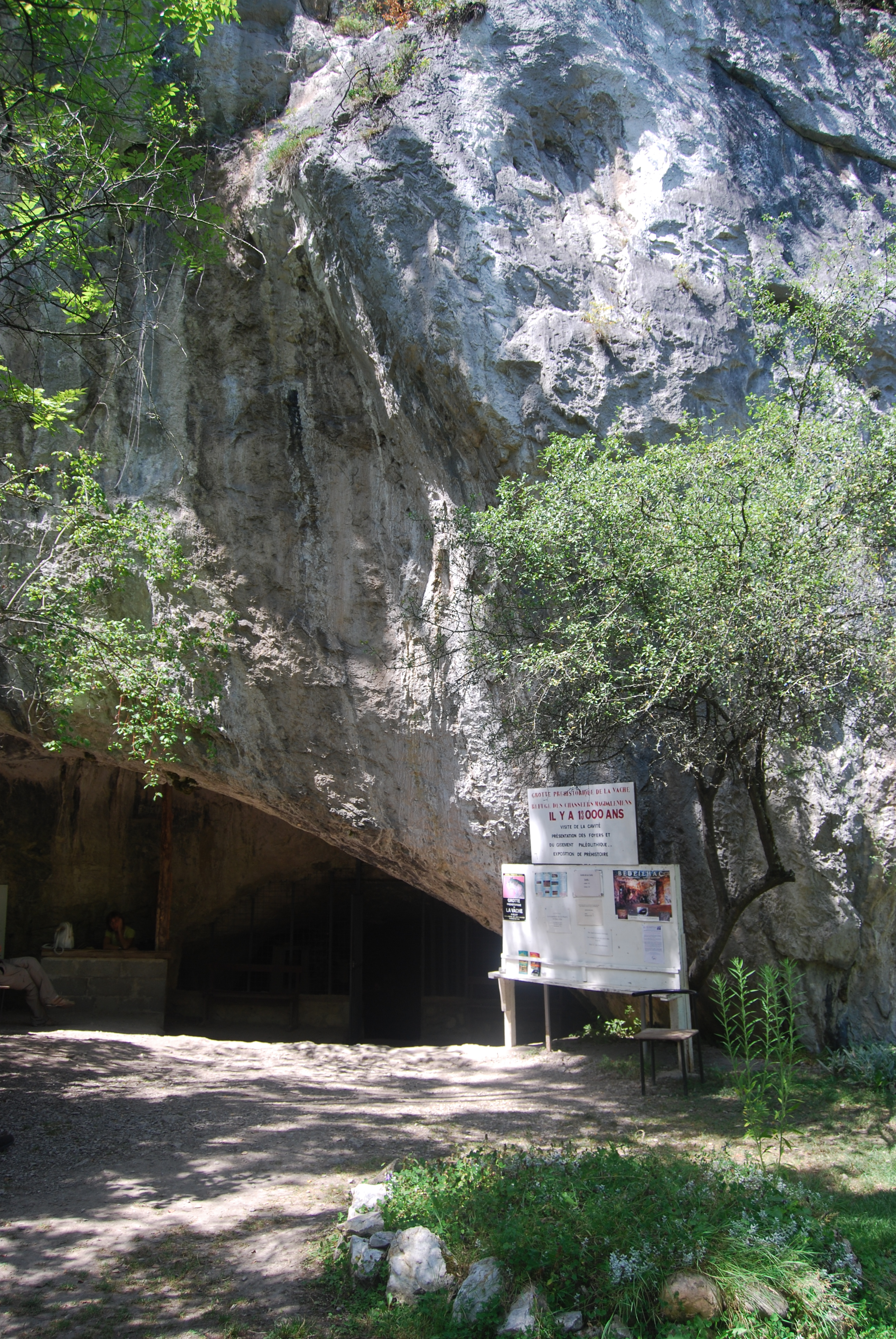 L'entrée principale de la grotte de la Vache, Alliat, Ariège.